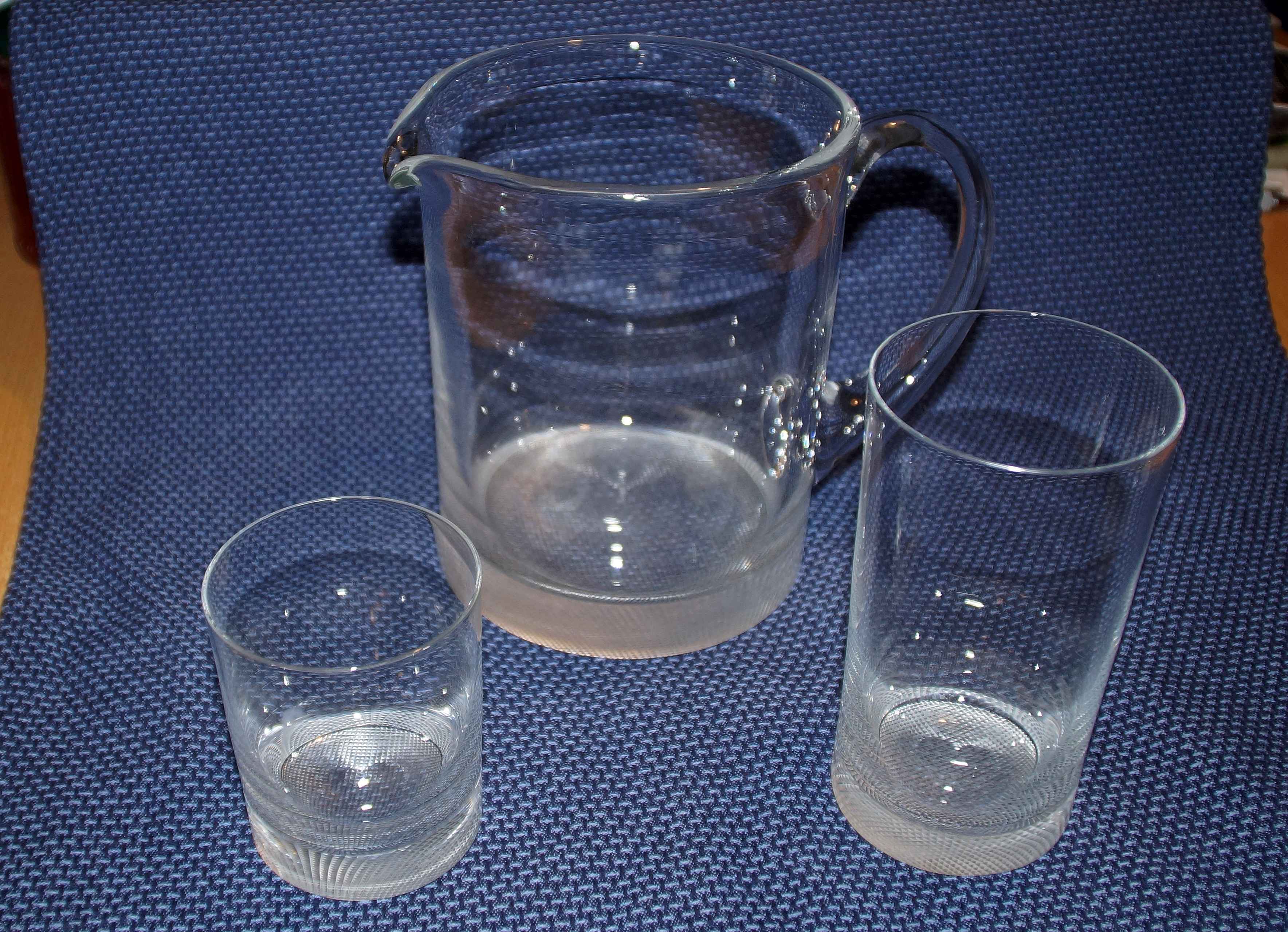 Bier- und Weinglas, Wasserkrug aus der Serie "Becherservice No. 248", Design: Adolf Loos 1931, Hersteller: Fa. Lobmeyr, Wien 2017